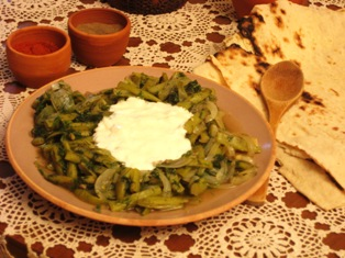 կանաչ լոբով բորանի